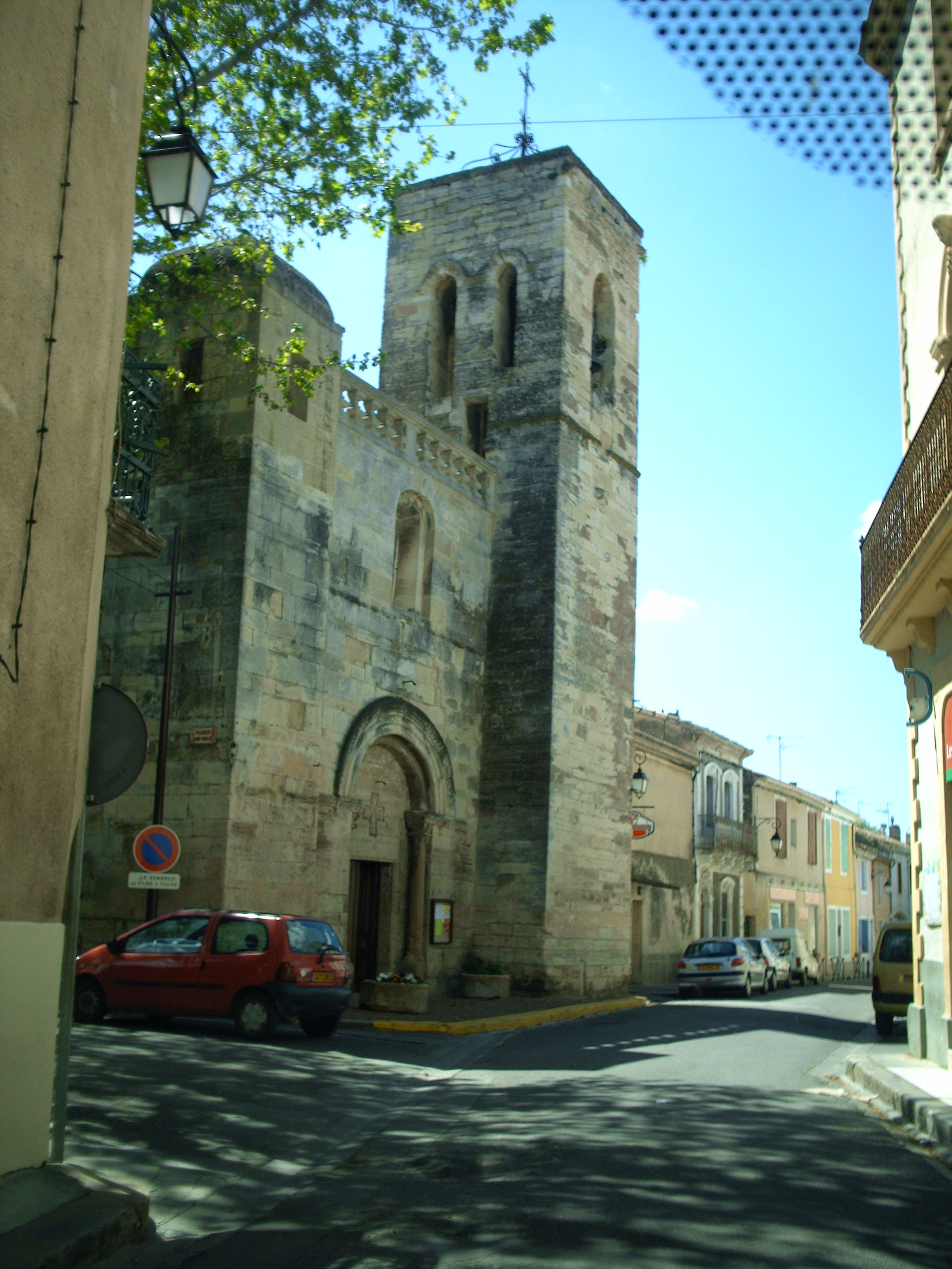 Eglise du Cailar (Gard)